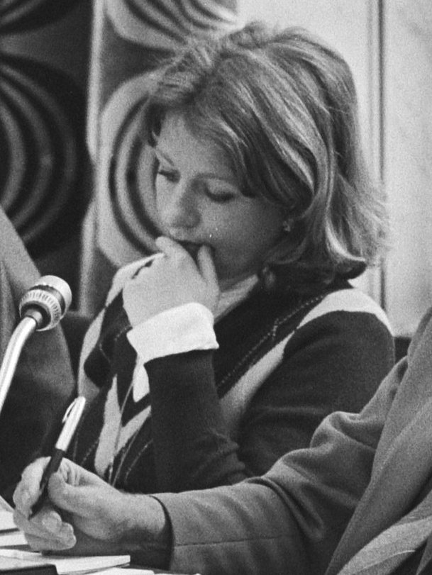 Collectie / Archief : Fotocollectie Anefo Reportage / Serie : Hoorzitting in Den Haag over de problematiek van de kleinverbruikers-tarieven van het aardgas Beschrijving : De leden van de vaste kamercommissie Economische Zaken: van links naar rechts Van Dis (SGP), Dekker (D66), Bakker (CPN), Dijkman (CDA) en Zijlstra (CDA) Datum : 30 september 1981 Locatie : Den Haag, Zuid-Holland Trefwoorden : aardgas, hoorzittingen, kleinverbruik, tarieven Persoonsnaam : Bakker, Marcus, Dekker, Suzanne, Dijkman, Stef, Dis, C.N. van, Zijlstra, Rinse Fotograaf : Croes, Rob C. / Anefo Auteursrechthebbende : Nationaal Archief Materiaalsoort : Negatief (zwart/wit) Nummer archiefinventaris : bekijk toegang 2.24.01.05 Bestanddeelnummer : 931-7127